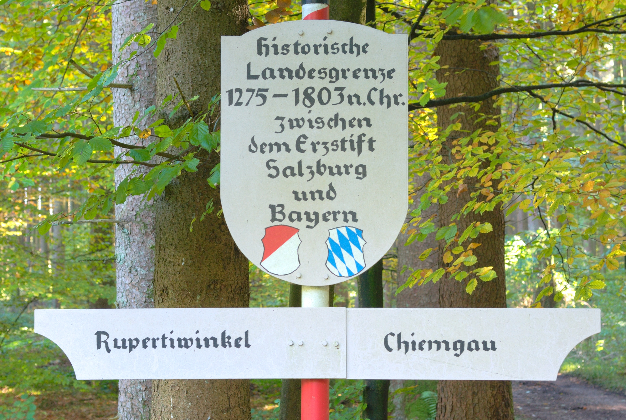 Hinweistafel auf die historische Grenze (1275-1803) zwischen dem Rupertiwinkel und dem Chiemgau auf der St2104 zwischen Pierling und Holzhausen, Abzweigung Schlichtersberg.